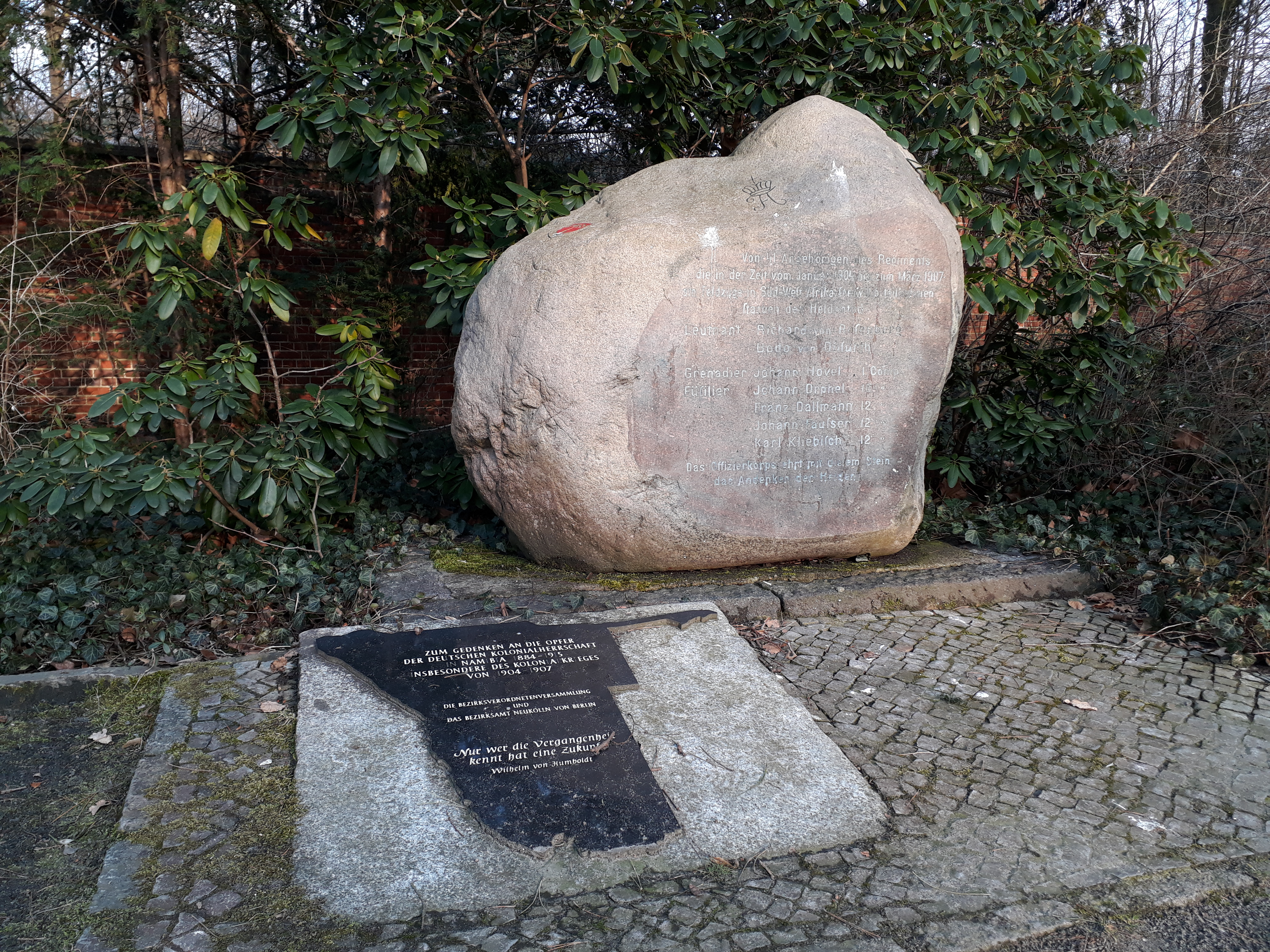 Sogenannter Herero-Stein auf dem Friedhof am Columbiadamm, Berlin